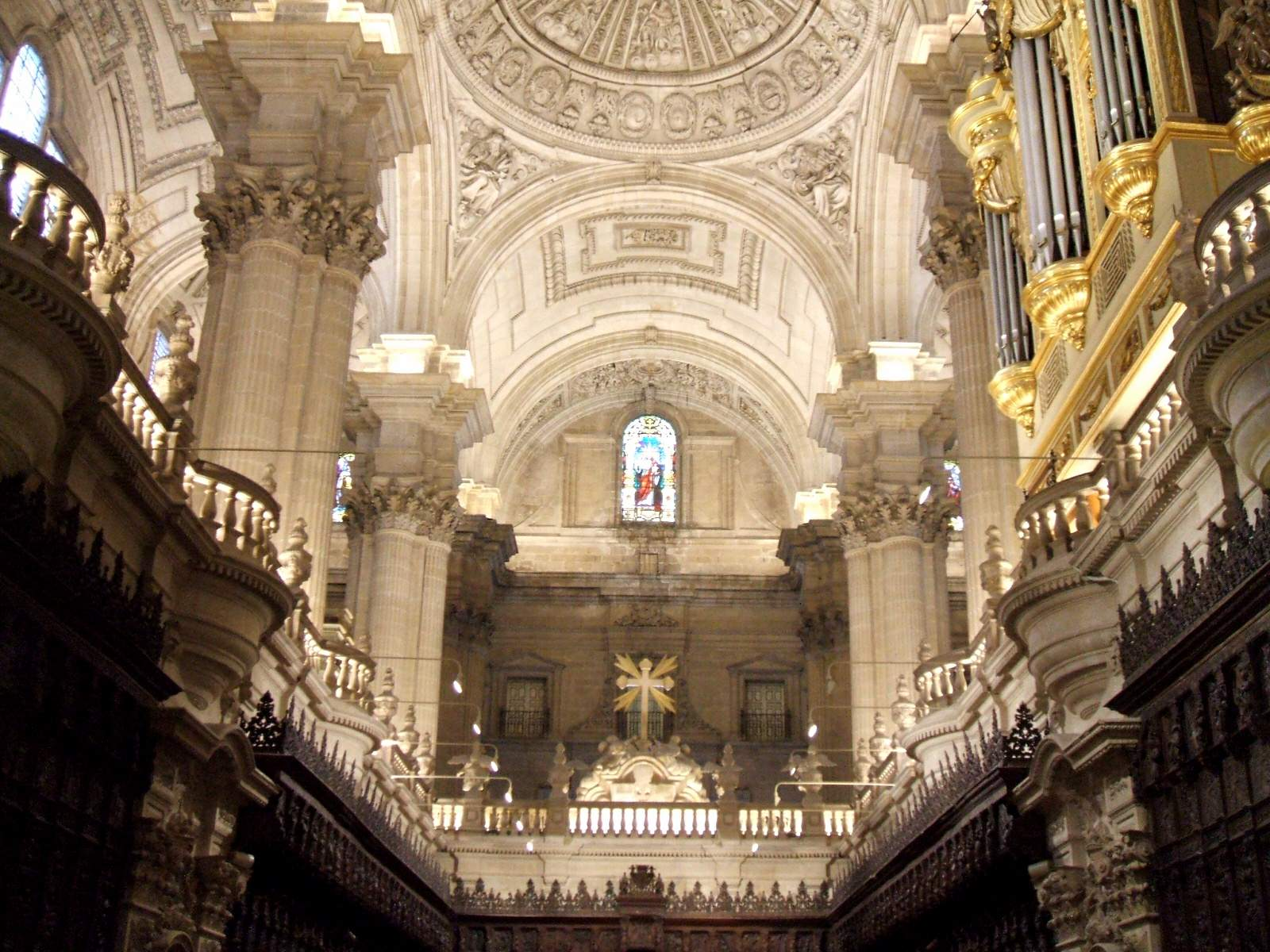 Bóvedas de la Catedral de Jaén